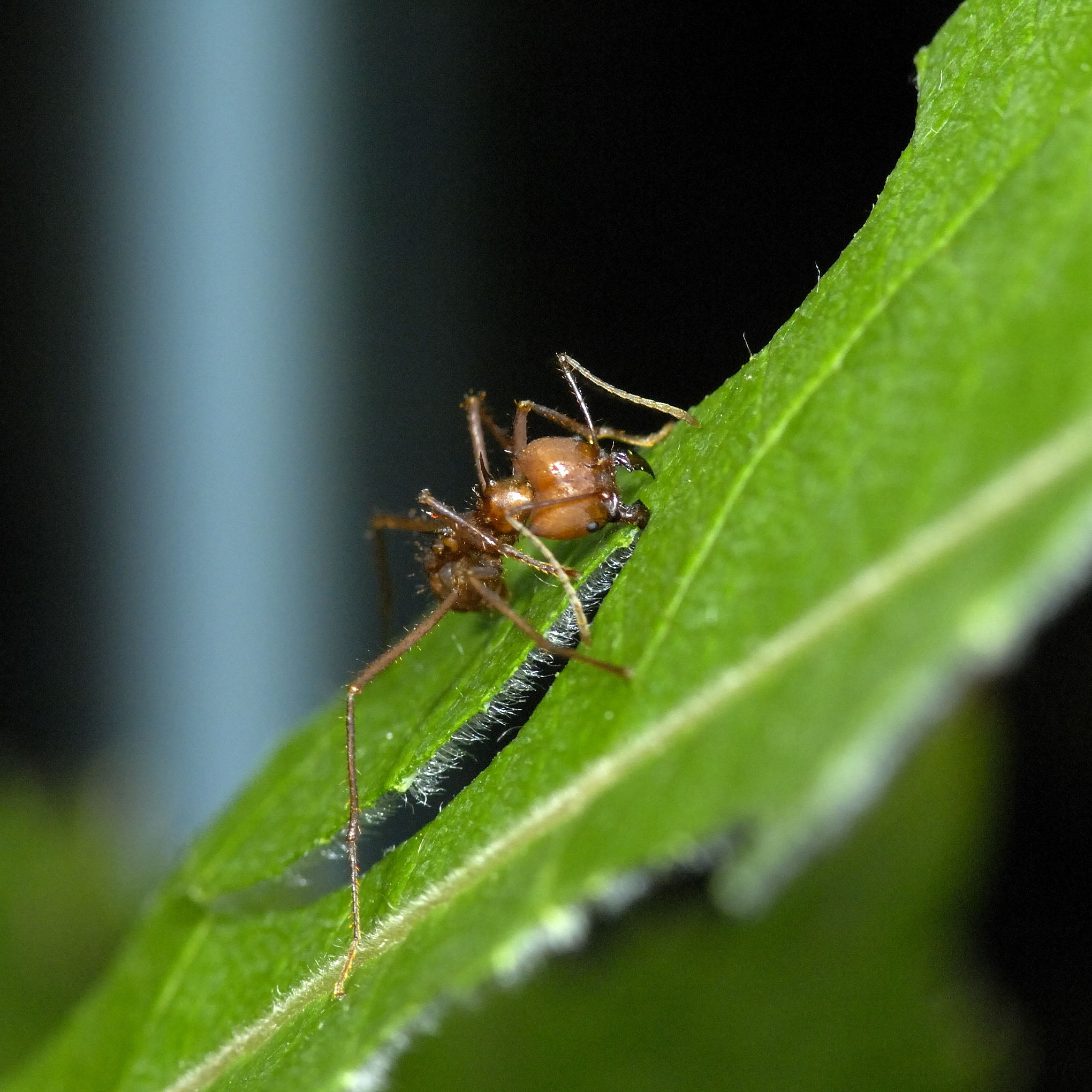 Blattschneiderameise (Atta) Tiergarten Schönbrunn